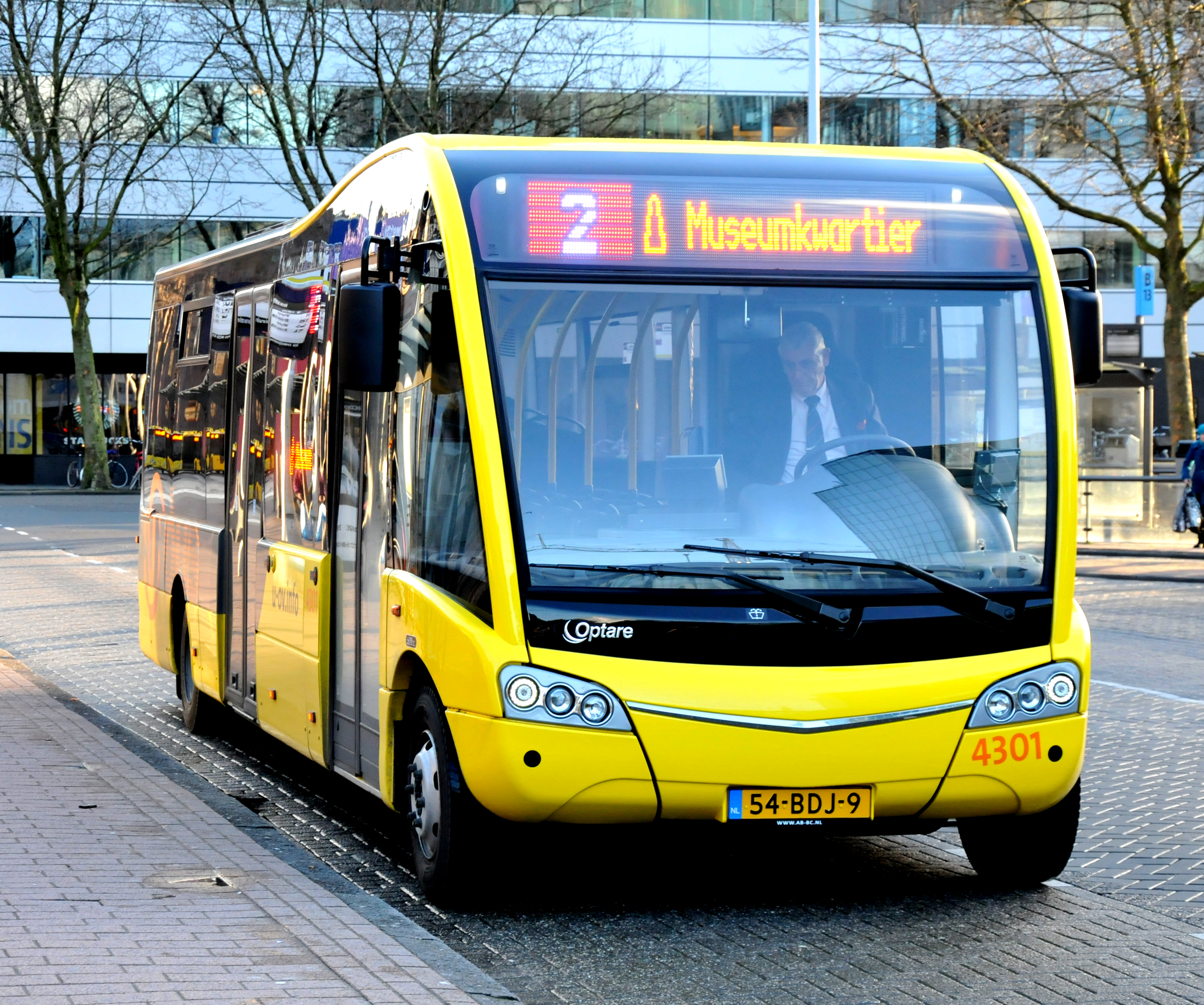 U-OV bus 4301 van het type Optare Solo te Utrecht.